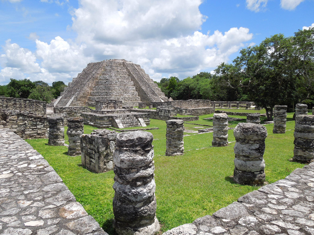 Mayapan